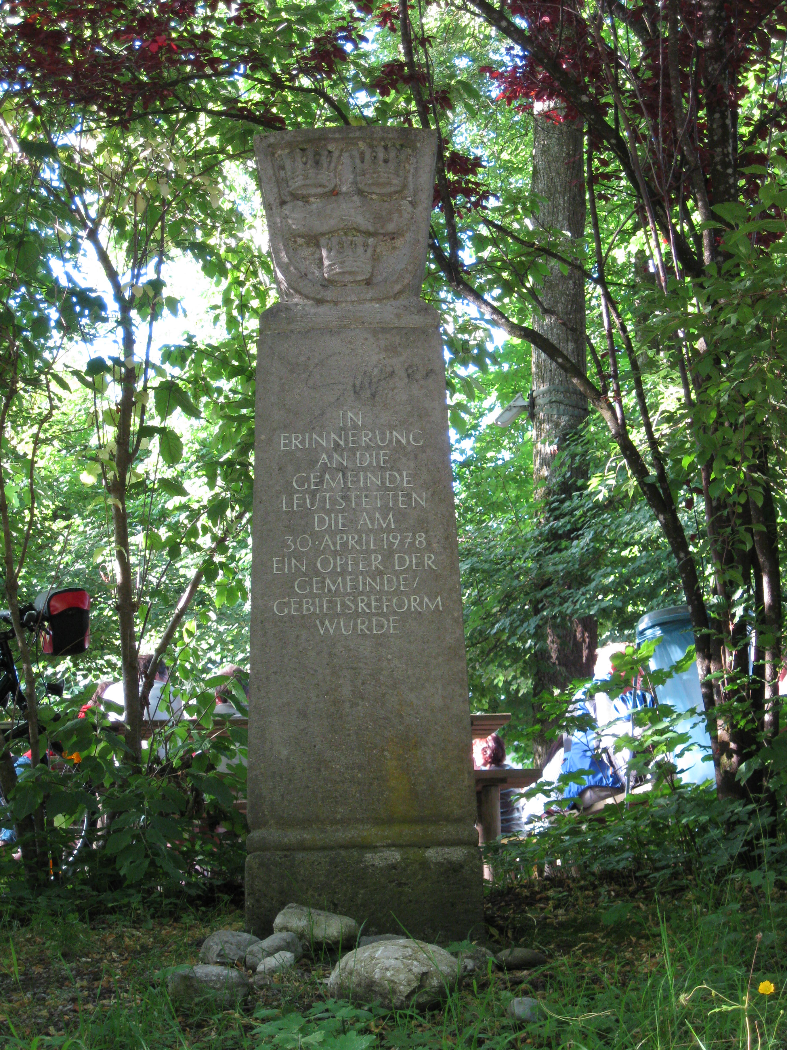 Gedenkstein für die Gemeinde Leutstetten, die durch die Gemeinde-/Gebietsreform beseitigt wurde. Heute Starnberg, Ortsteil Leutstetten.